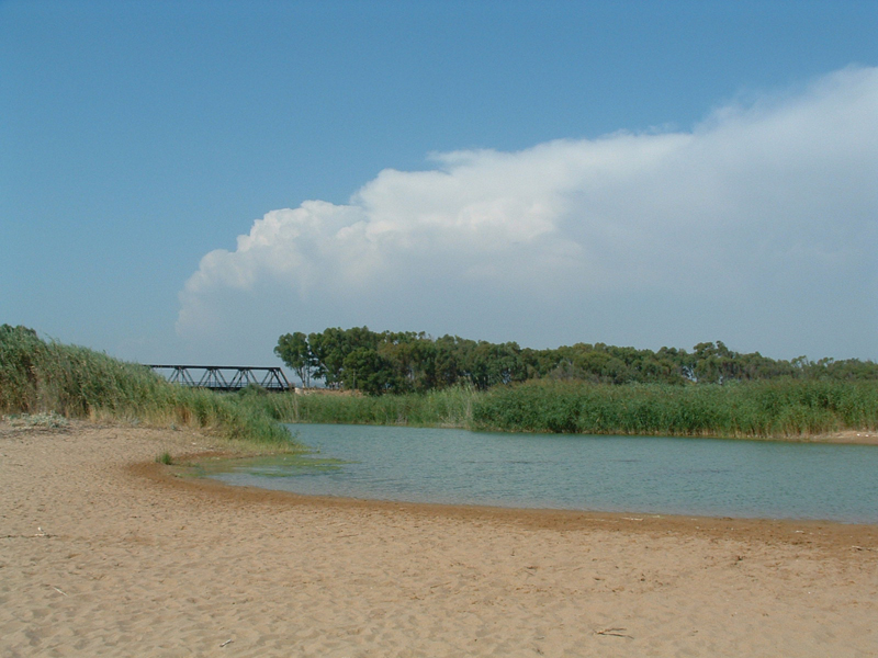 foto della foce del fiume Belice